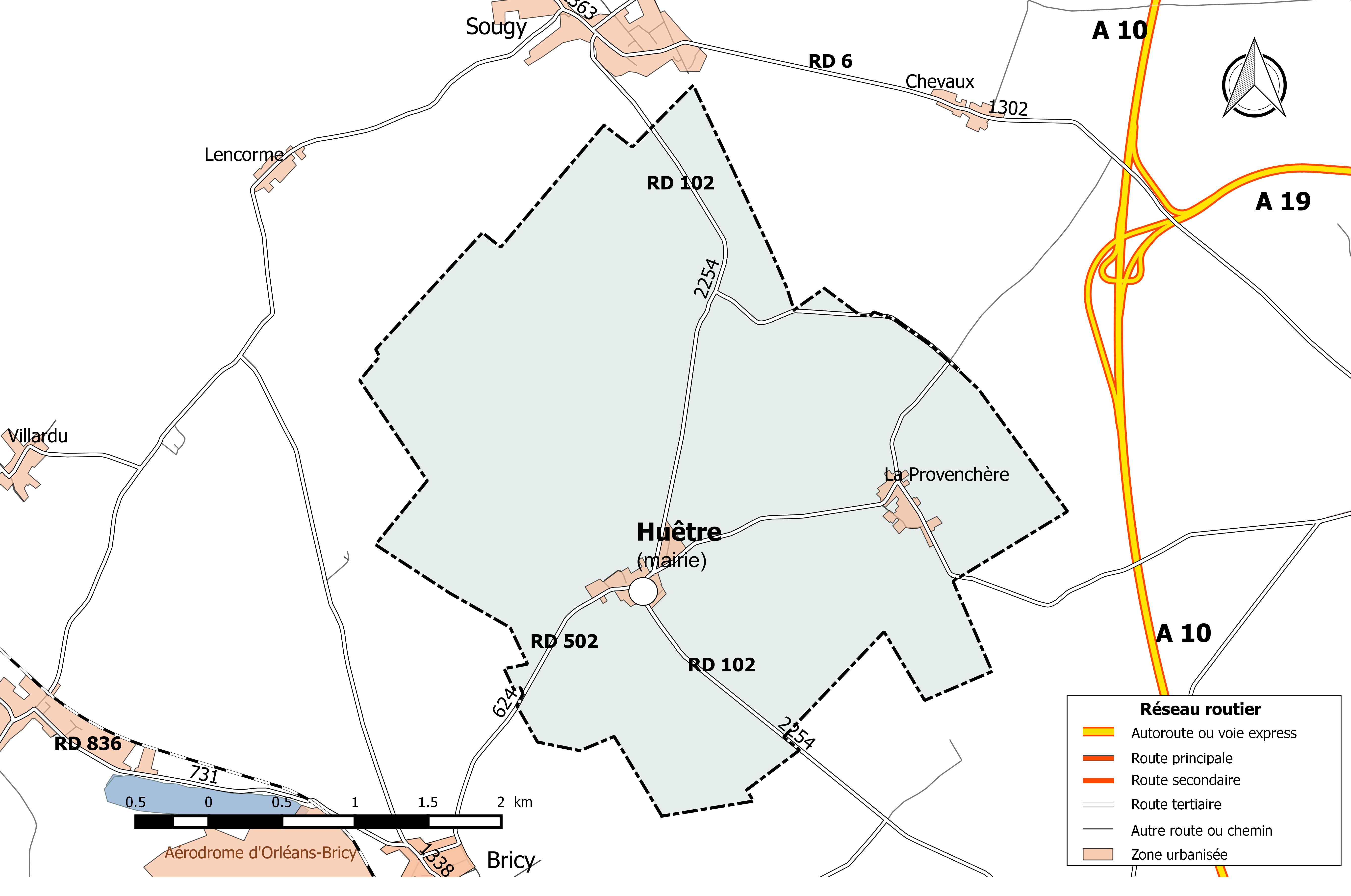 Carte du réseau routier de la commune de Huêtre.